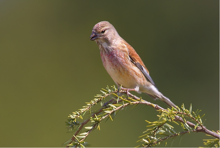 Carduelis cannabina, Olomouc, CZ